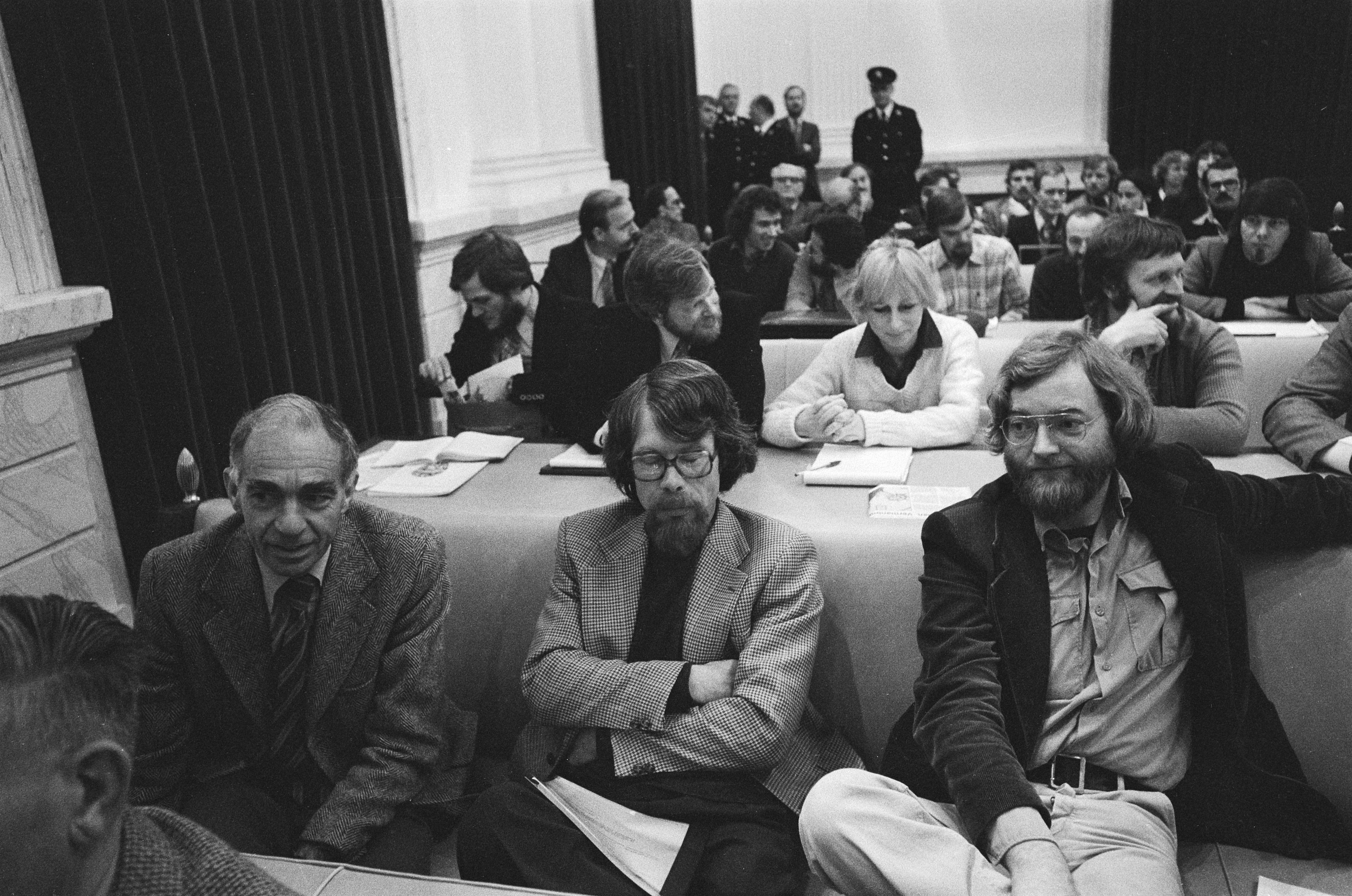 Collectie / Archief : Fotocollectie Anefo Reportage / Serie : [ onbekend ] Beschrijving : Voortzetting proces in hoger beroep amatateurarcheoloog Tjerk Vermaning in Leeuwarden. Deskundigen die zeggen dat de vondsten niet echt zijn. H.T. Waterbolk (links), Otto H. Harsema en Dick Stapert (rechts), allen verbonden aan het Biologisch-Archeologisch Insituut van de Rijksuniversiteit Groningen Datum : 30 november 1978 Locatie : Friesland, Leeuwarden Trefwoorden : archeologie, processen Persoonsnaam : Harsema, O., Stapert, D., Vermaning, Tjerk, Waterbolk, H.T. Fotograaf : Verhoeff, Bert / Anefo Auteursrechthebbende : Nationaal Archief Materiaalsoort : Negatief (zwart/wit) Nummer archiefinventaris : bekijk toegang 2.24.01.05 Bestanddeelnummer : 930-0234